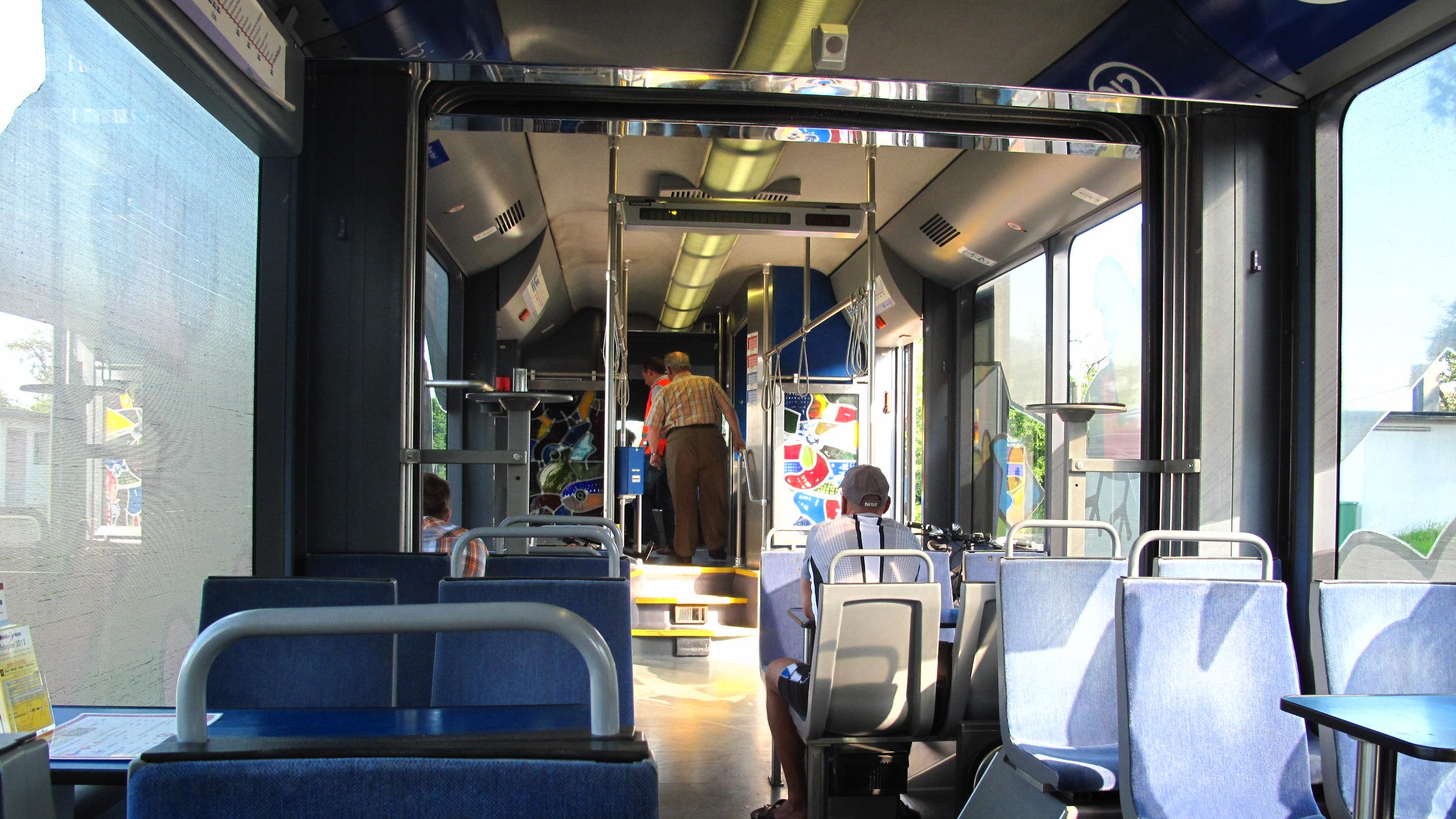 Dieser RegioSprinter wurde von Otmar Alt außen und innen gestaltet und mit diversen Einrichtungen für Sonderfahrten versehen, außerdem wurde die Bestuhlung etwas gelichtet. Sponsor war die Linnicher Firma SIG, daher deren Logo an der Decke.